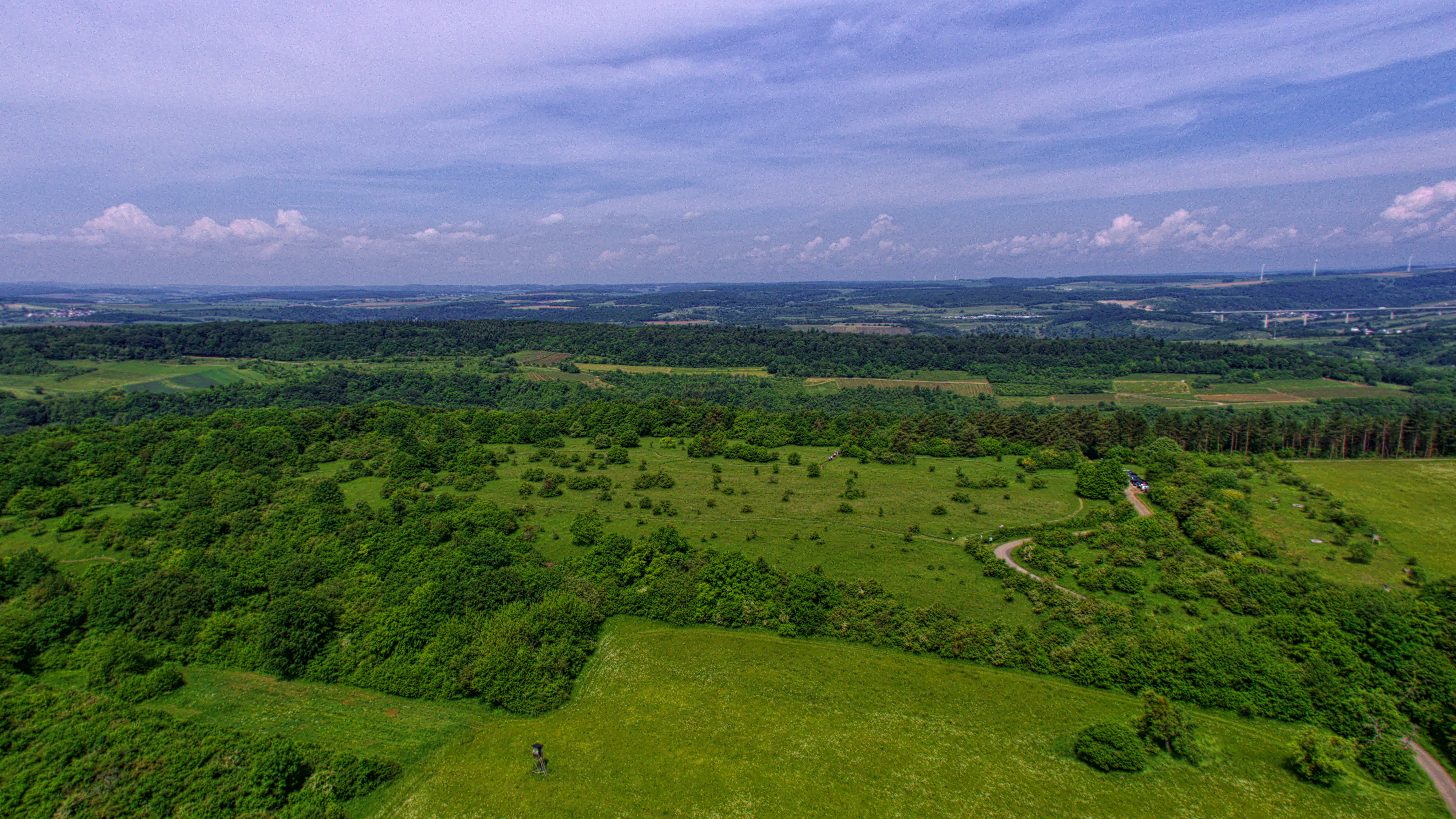 Gesamtüberblick Naturschutzgebiet Perfeist bei Wasserliesch (vor allem ein Orchideenstandort) an der Mosel. Das Naturschutzgebiet liegt in der Mitte des Bildes, links vom schlängeligem Weg und geht bis an den linken Bildrand. Im wesentlichen ist es eine Wiese mit Büschen und Orchideen.